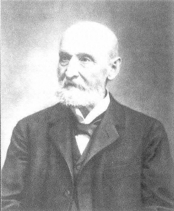 August Wilhelm Stummer (1827 - 1909), Rakouský a český podnikatel a politik.